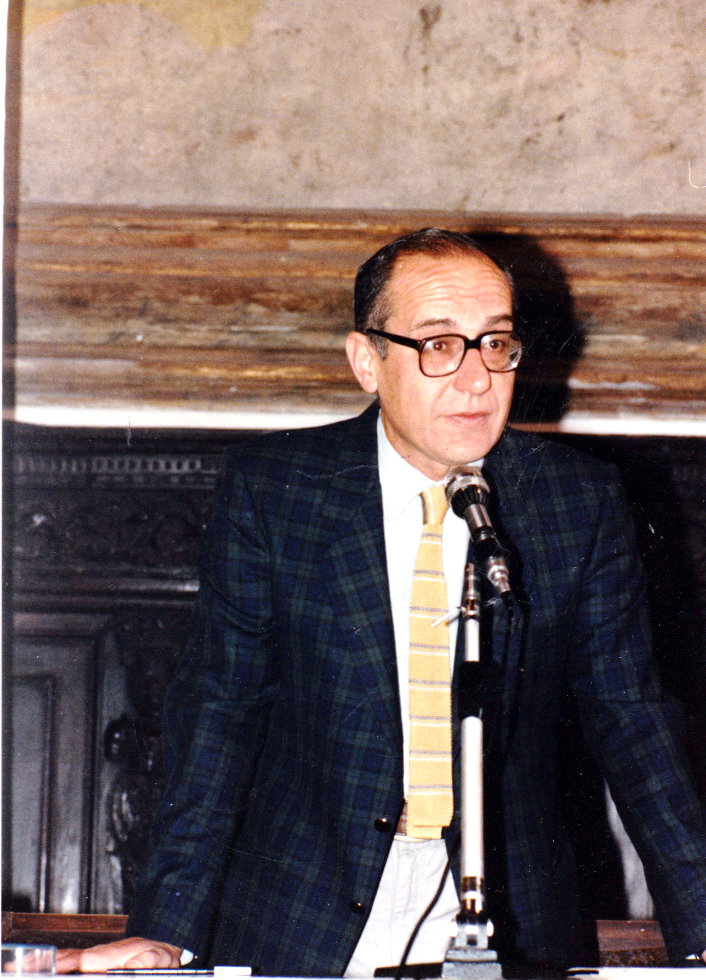 Vittorio Castellani durante una conferenza